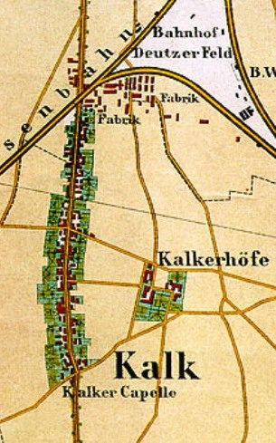 Ausschnitt aus der Karte des Raumes zwischen Deutz und Merheim um 1865